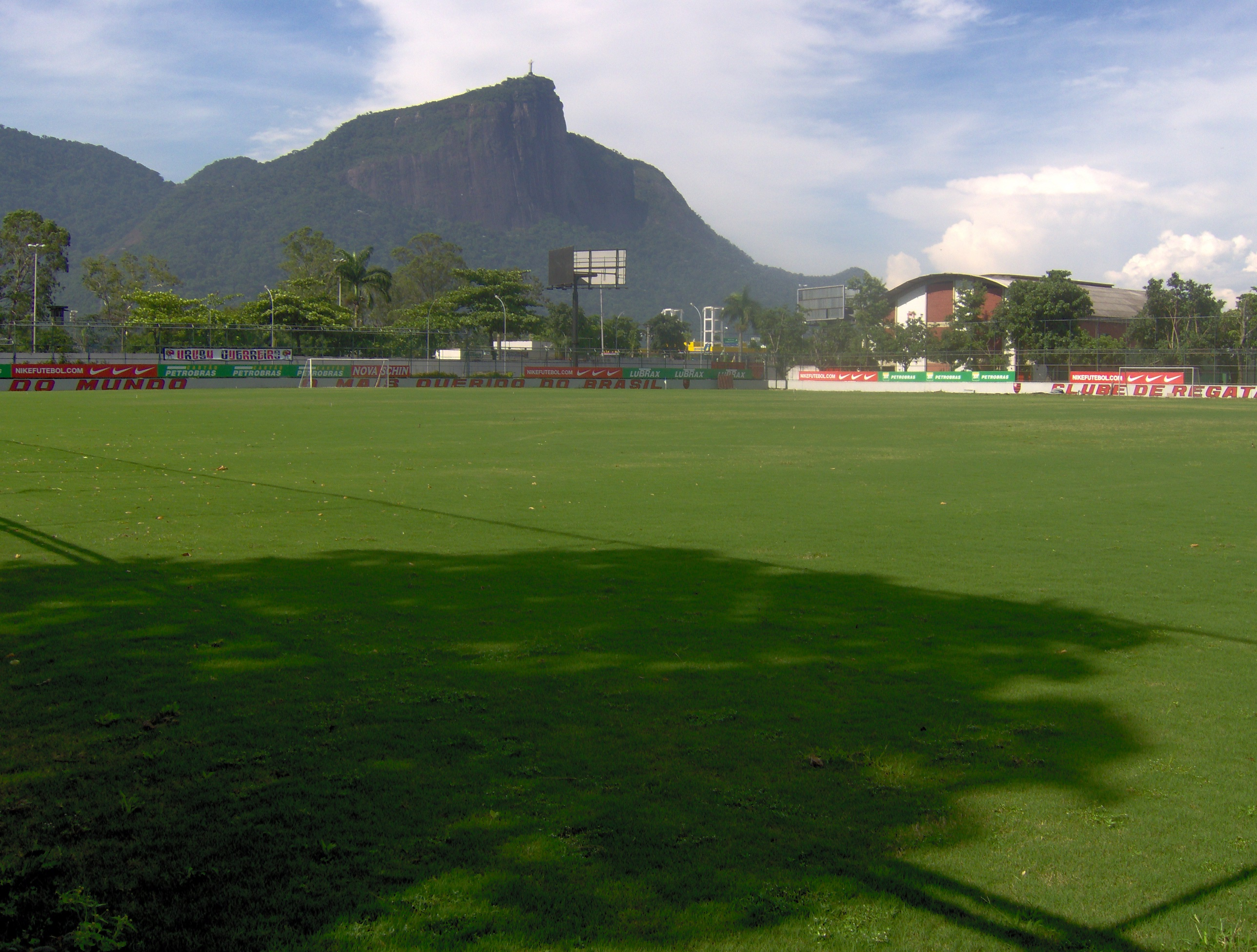 Estádio da Gávea. Campo do Clube de Regatas do Flamengo.